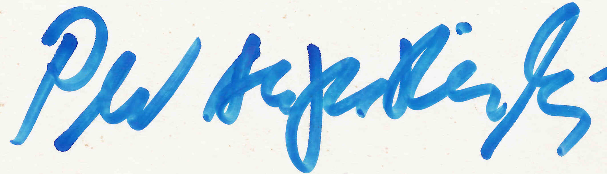 Autogramm von Peer Augustinski aus der Sammlung von Udo Grimberg